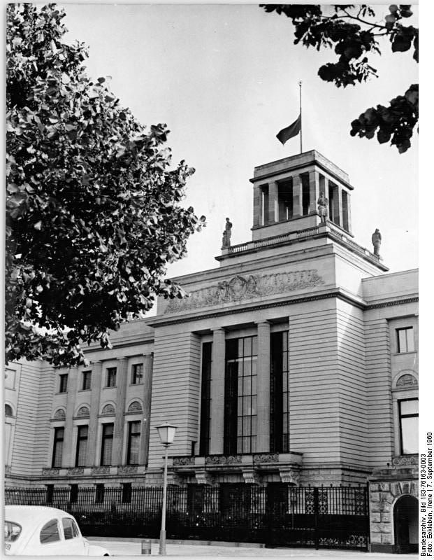 Berlin, Sowjetische Botschaft Zentralbild Eckleben-Gal-Dn-7.9.1960 Die DDR trauert um ihren Präsidenten.Mit tiefer Trauer und Anteilnahme hat die Bevölkerung der Deutschen Demokratischen Republik die Nachricht vom Tode des Präsidenten des ersten Deutschen Arbeiter-und Bauern-Staates aufgenommen,dessen Name für immer unauslöschlichmit dem jahrzentelangem Kampf der Deutschen Arbeiterklasse und mit der Krönung dieses Kampfes durch die Gründung der Deutschen Demokratischen Republik verbunden ist.UBz: Die Fahne auf dem Gebäude der Botschaft der UdSSR in Berlin wurde auf Halbmast gesetzt.